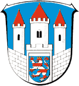 Wappen von Liebenau (Hessen)